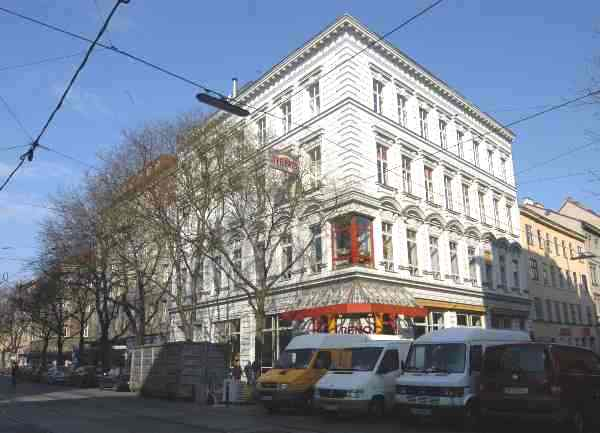 ehemalige Komenskyschule Wien-Favoriten, Quellenstr. 72